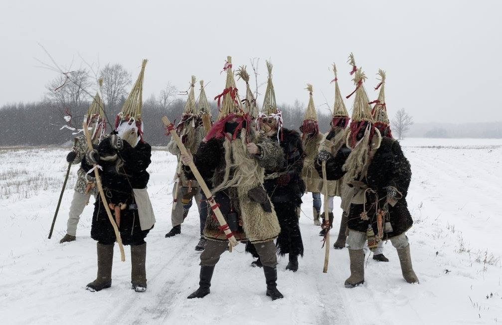 Zemgales un Kurzemes Meteņu masku grupa Budēļi, buduļi vai būduļi.